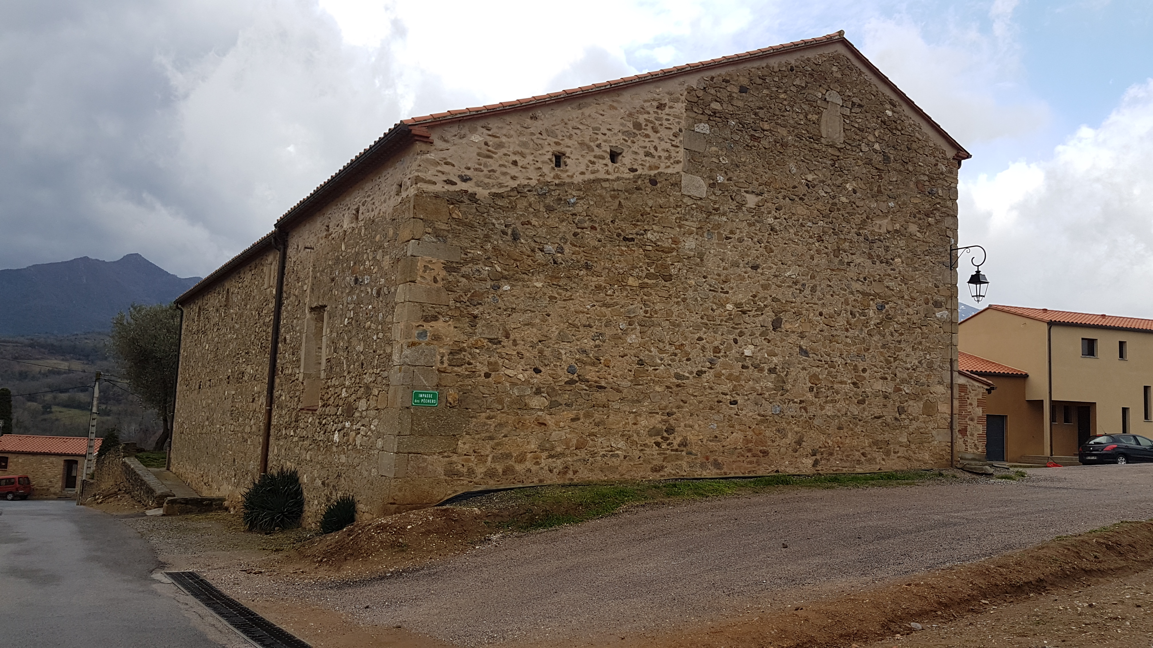 Le côté nord de l'église de la Nativité-de-Notre-Dame de Los Masos